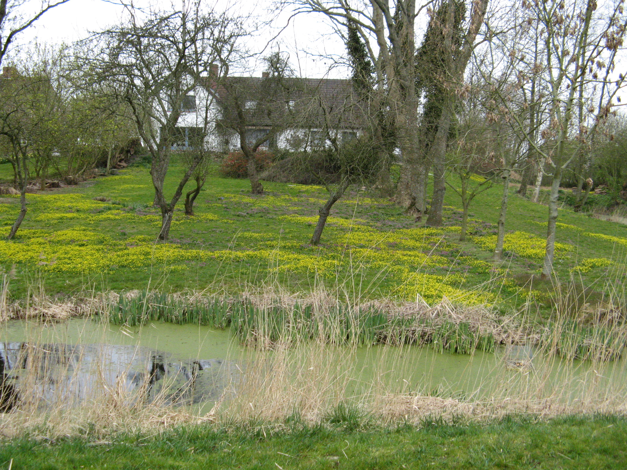 Museum in Fahretoft. Author: Dirk Ingo Franke